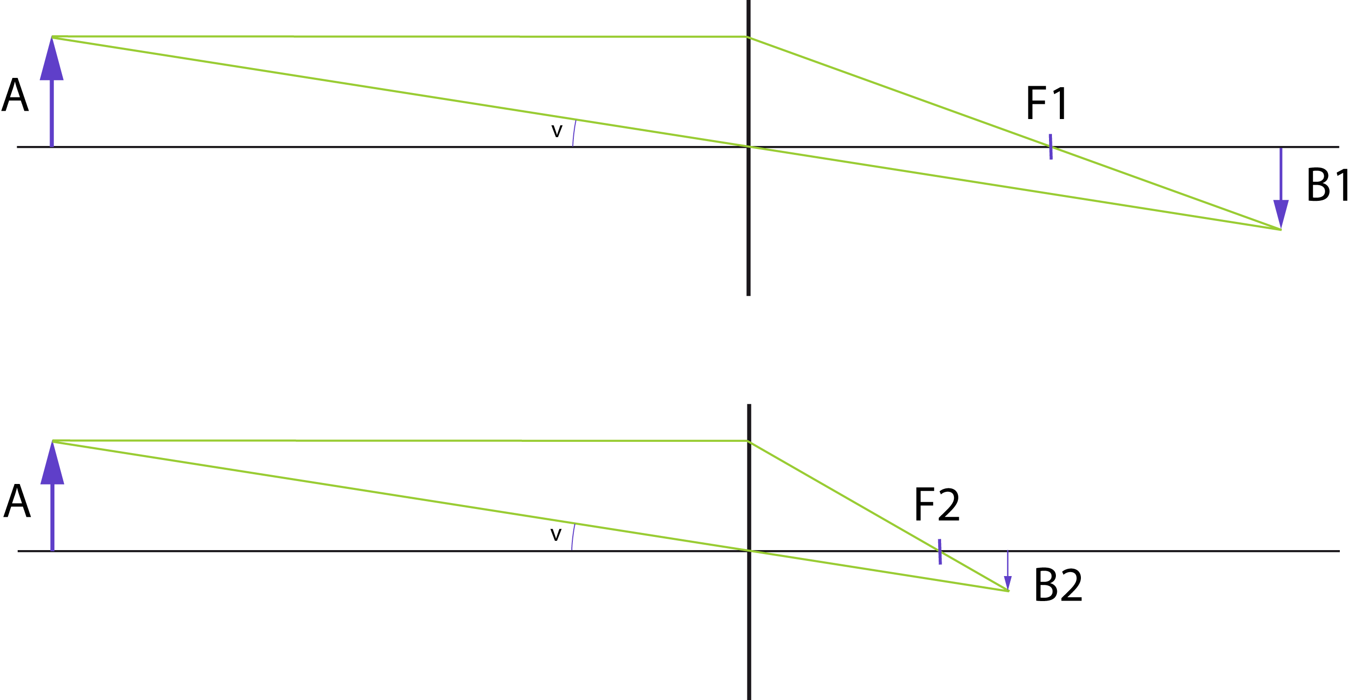 Bilden visar hur vid konstant fotograferingsavstånd, avbildningsskalan är approximativt proportionell med brännvidden. Optikens tjocklek antas försumbar i förhållande till fotograferingsavståndet.